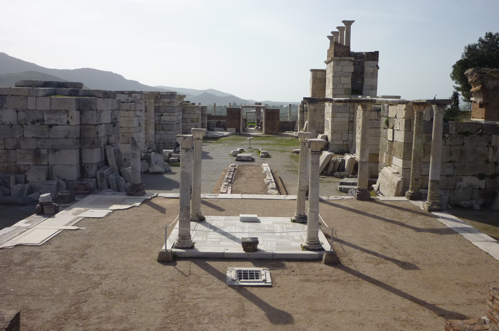 Johanneskirche (Ephesos): Kirchenschiff und Grabkammer